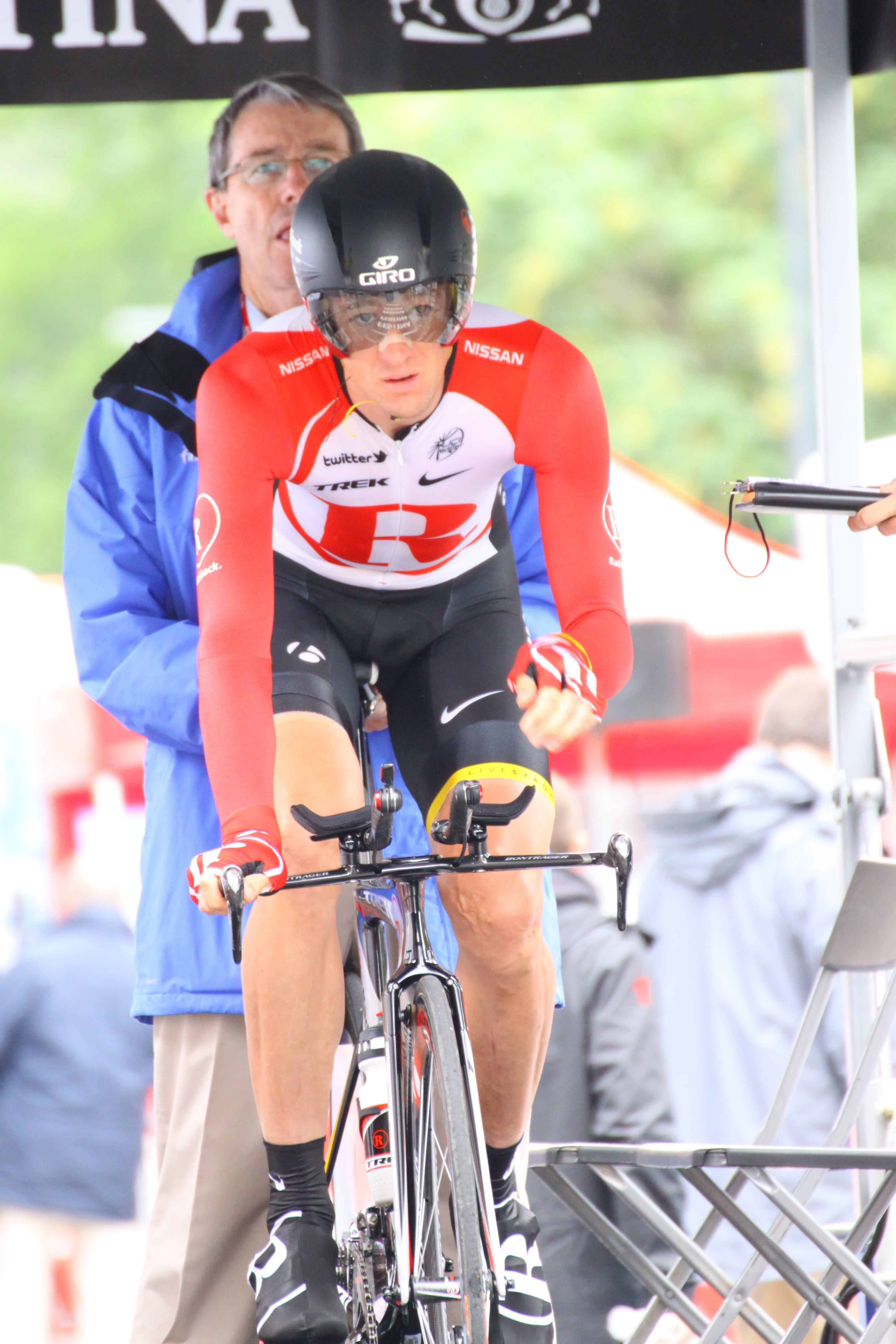 Jason McCartney au départ du contre-la-montre du Critérium du Dauphiné 2011 à Grenoble